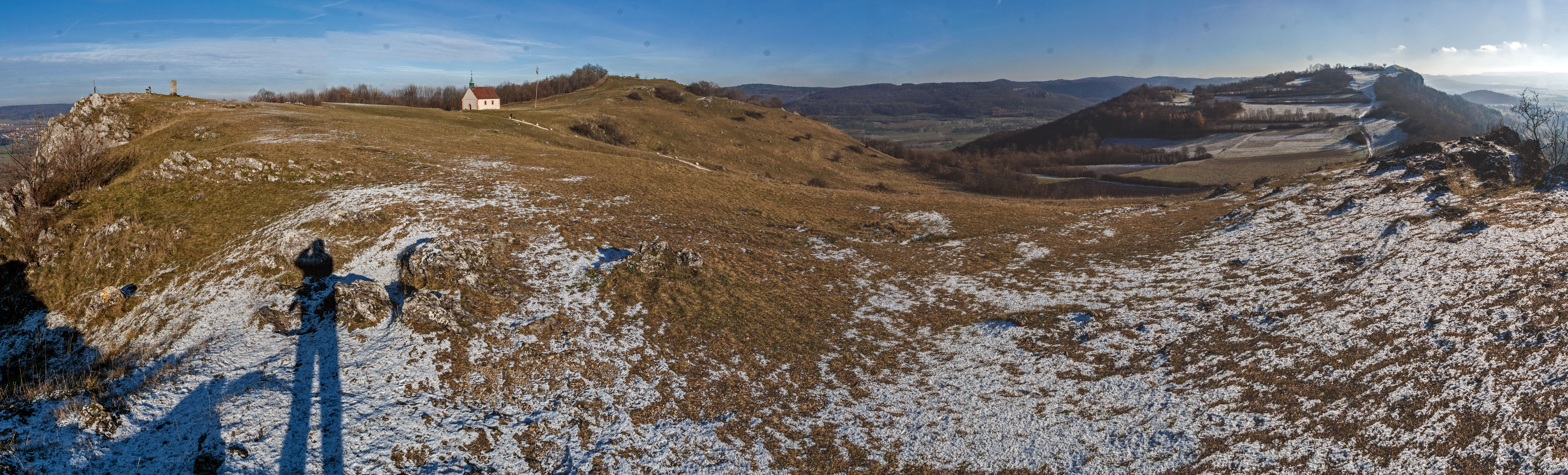 Ehrenbürg, Walberla, Panorama, Plateau